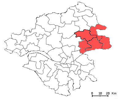 L'arrondissement d'Ancenis et ses 5 cantons.